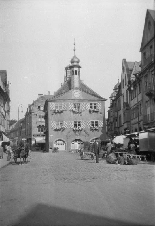 Altes Rathaus Motiv: Bad Kissingen, Bayern Kategori: Stadsmiljö, Rådhus Altes Rathaus.